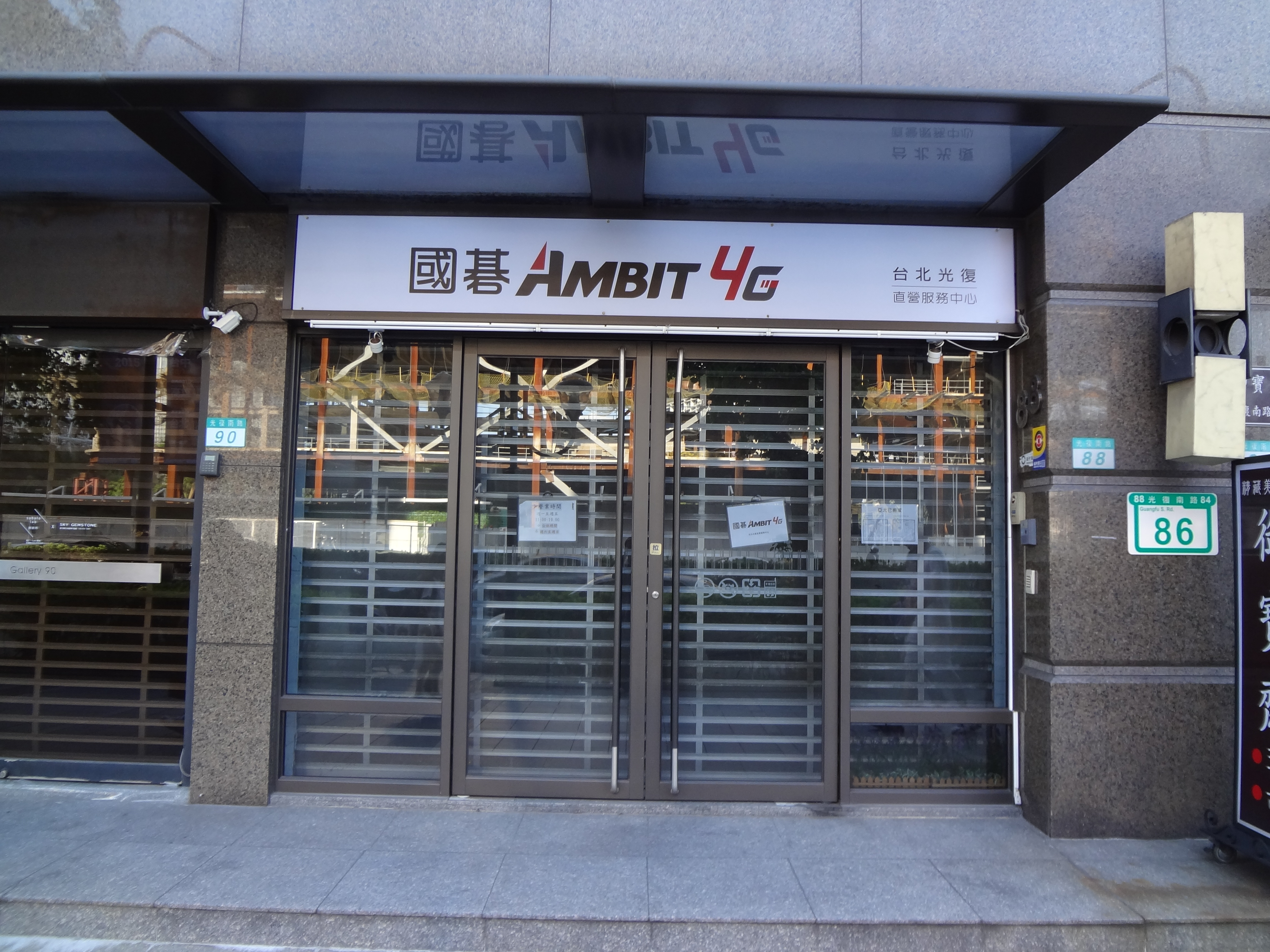 國碁電子台北光復直營服務中心，地址：臺北市大安區光復南路88號1樓。